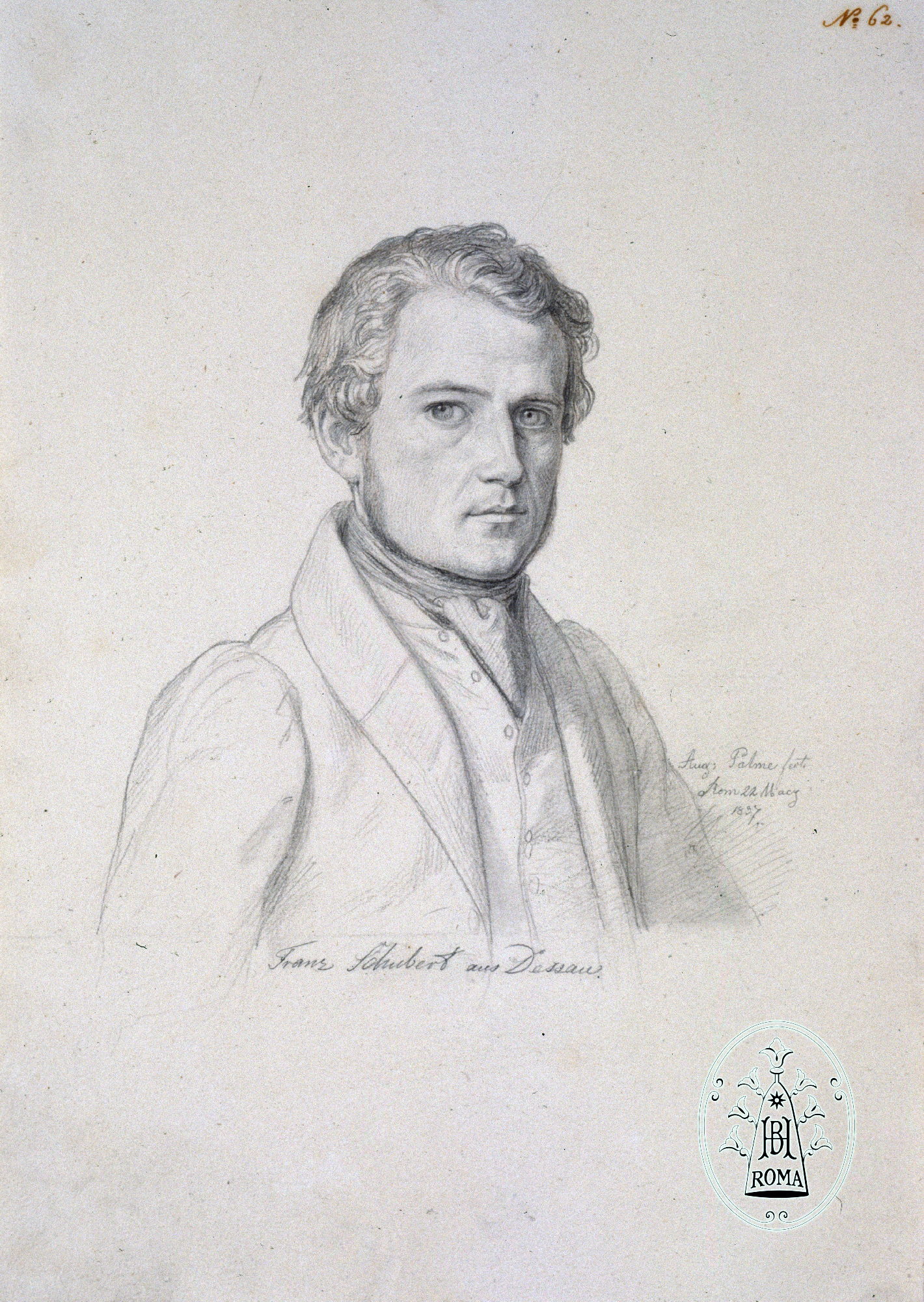 Porträt Franz August Schubert (1806–1893), gezeichnet von Augustin Palme, Rom 1837